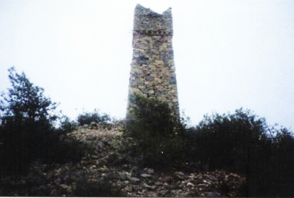 حصون بلاد قبيلة حوالة